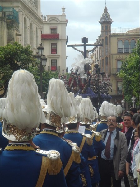 el cerro del aguila semana santa